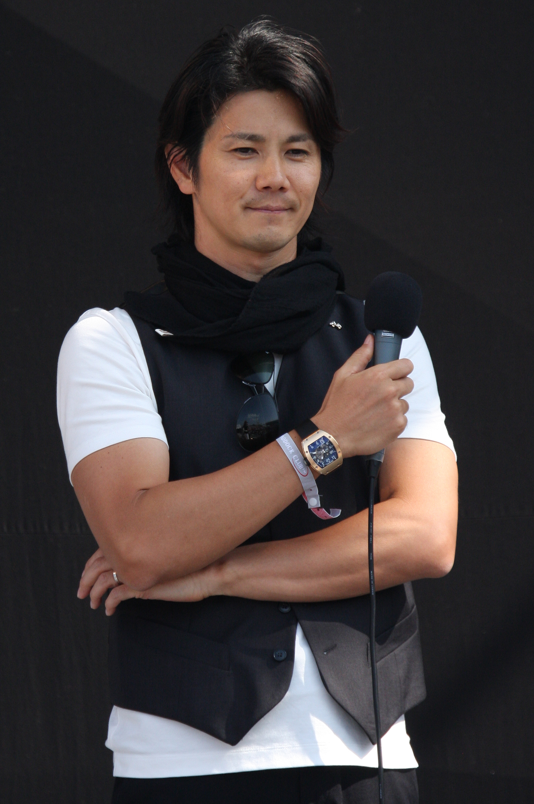 Formula One 2009 Rd.15 Japanese GP: Shinji Nakano